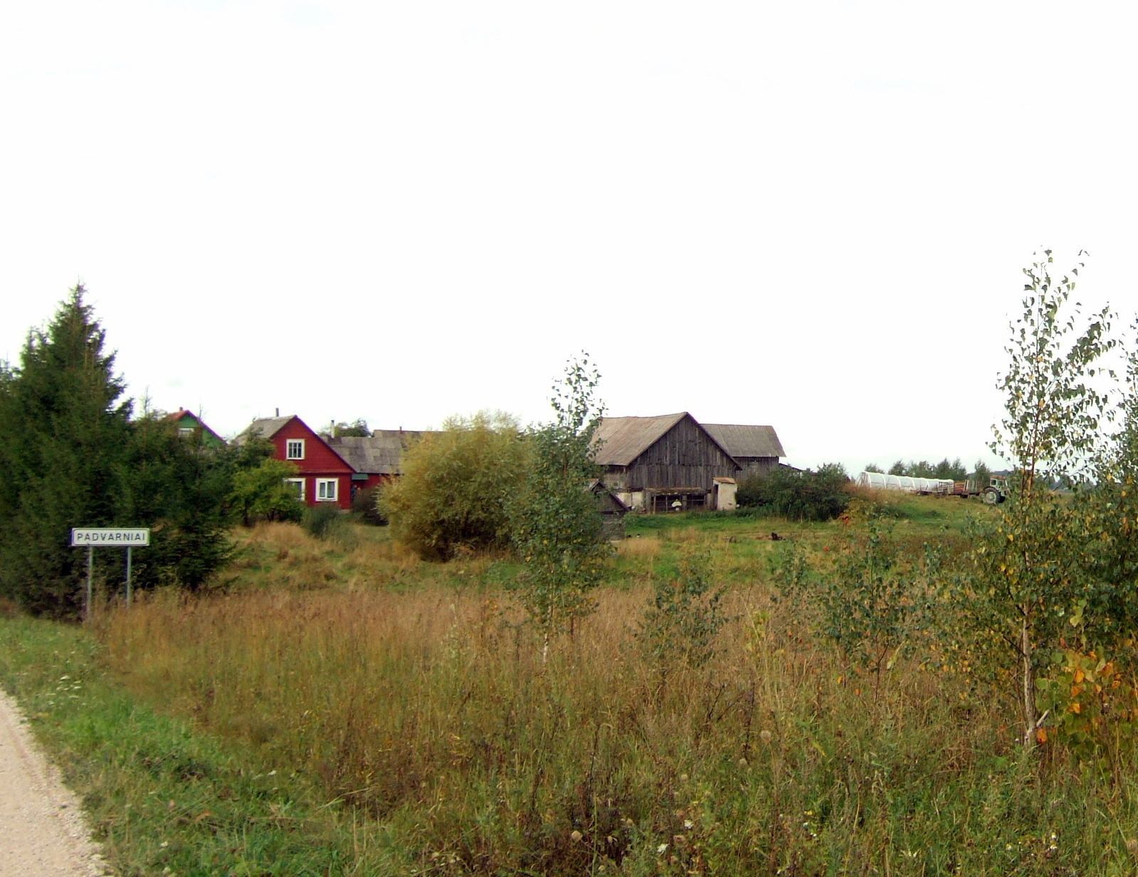 Padvarnių kaimas (Suginčių seniūnija)